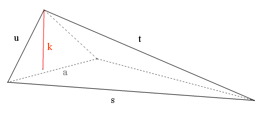 Ausgeschnittene Pyramide beim Großen Ikosaeder.